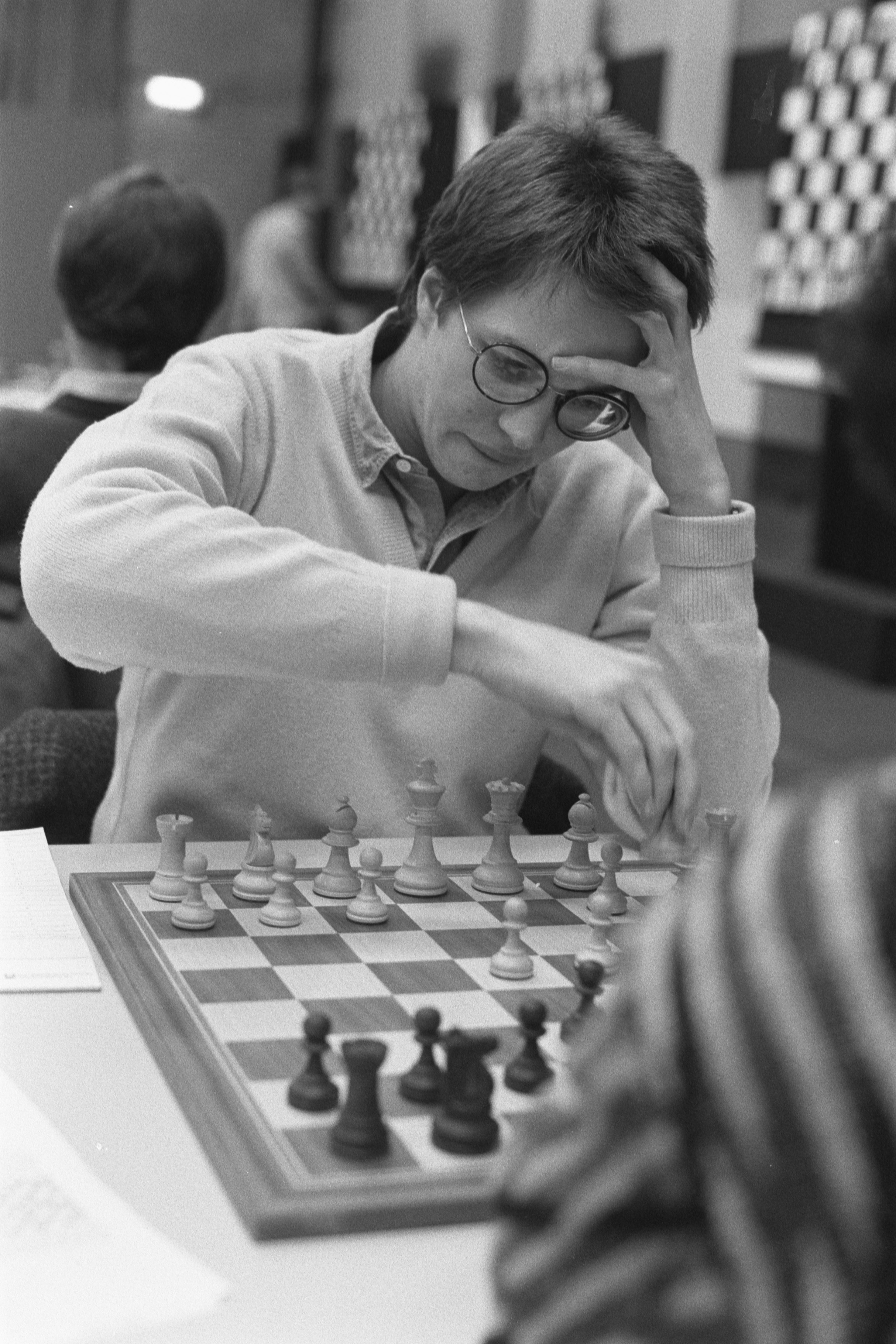 Collectie / Archief : Fotocollectie Anefo Reportage / Serie : [ onbekend ] Beschrijving : Hoogovensschaaktoernooi; koploper Short aan zet (tegen Nogueiras) Datum : 30 januari 1987 Trefwoorden : schaken Instellingsnaam : Hoogovenschaaktournooi Fotograaf : Bogaerts, Rob / Anefo Auteursrechthebbende : Nationaal Archief Materiaalsoort : Negatief (zwart/wit) Nummer archiefinventaris : bekijk toegang 2.24.01.05 Bestanddeelnummer : 933-8755